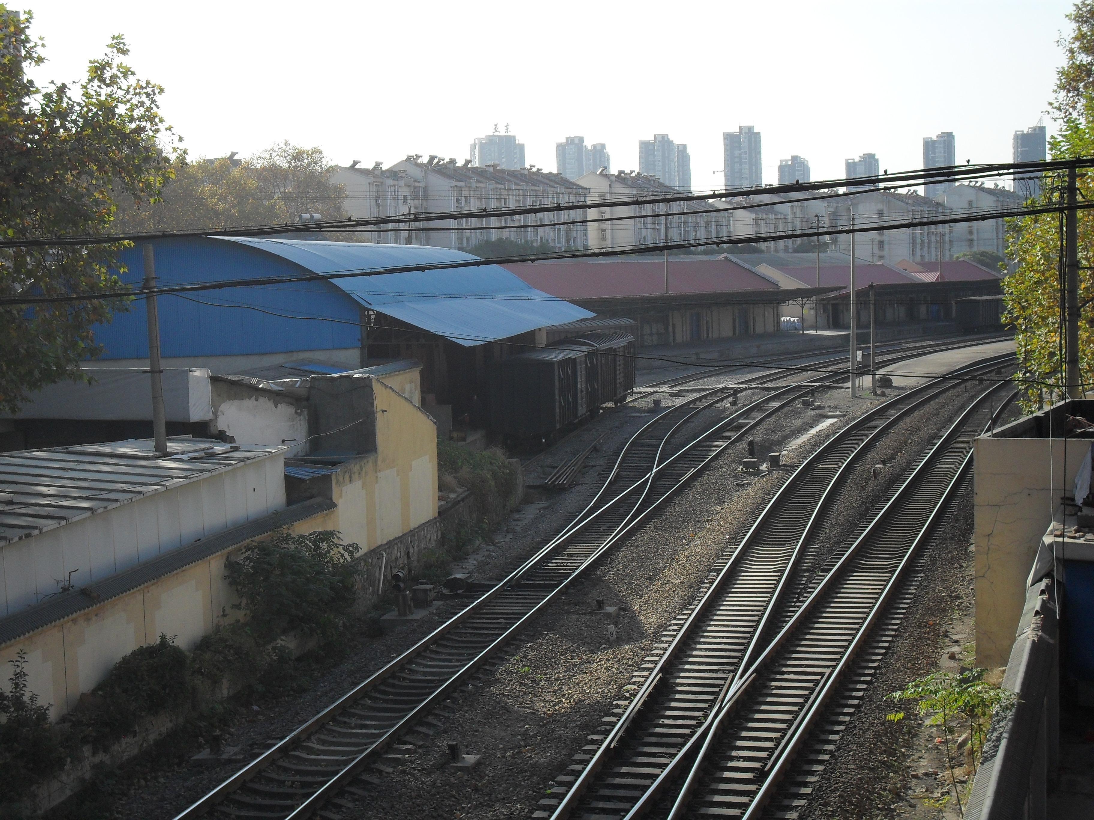 南京中华门火车站